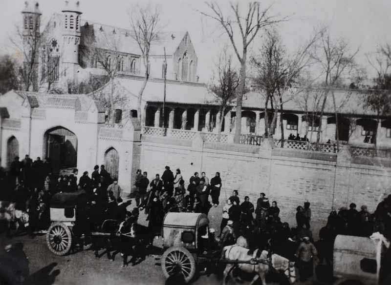 宣化主教座堂，位于今中华人民共和国河北省张家口市宣化区